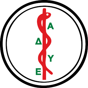 Λογότυπο Αυτοοργανωμένης Δομής Υγείας Εξαρχείων